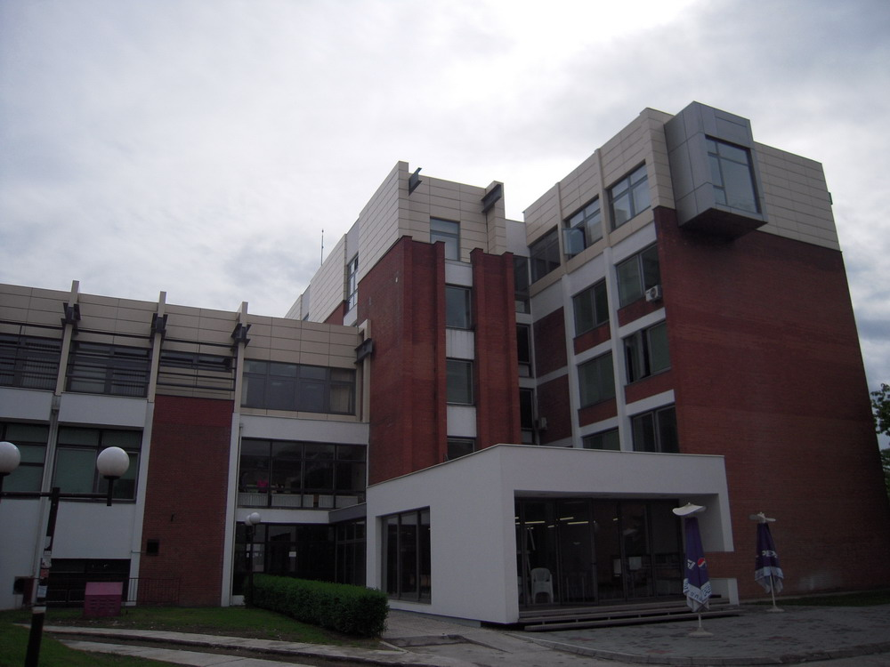 Ekonomski_fakultet-Banja Luka